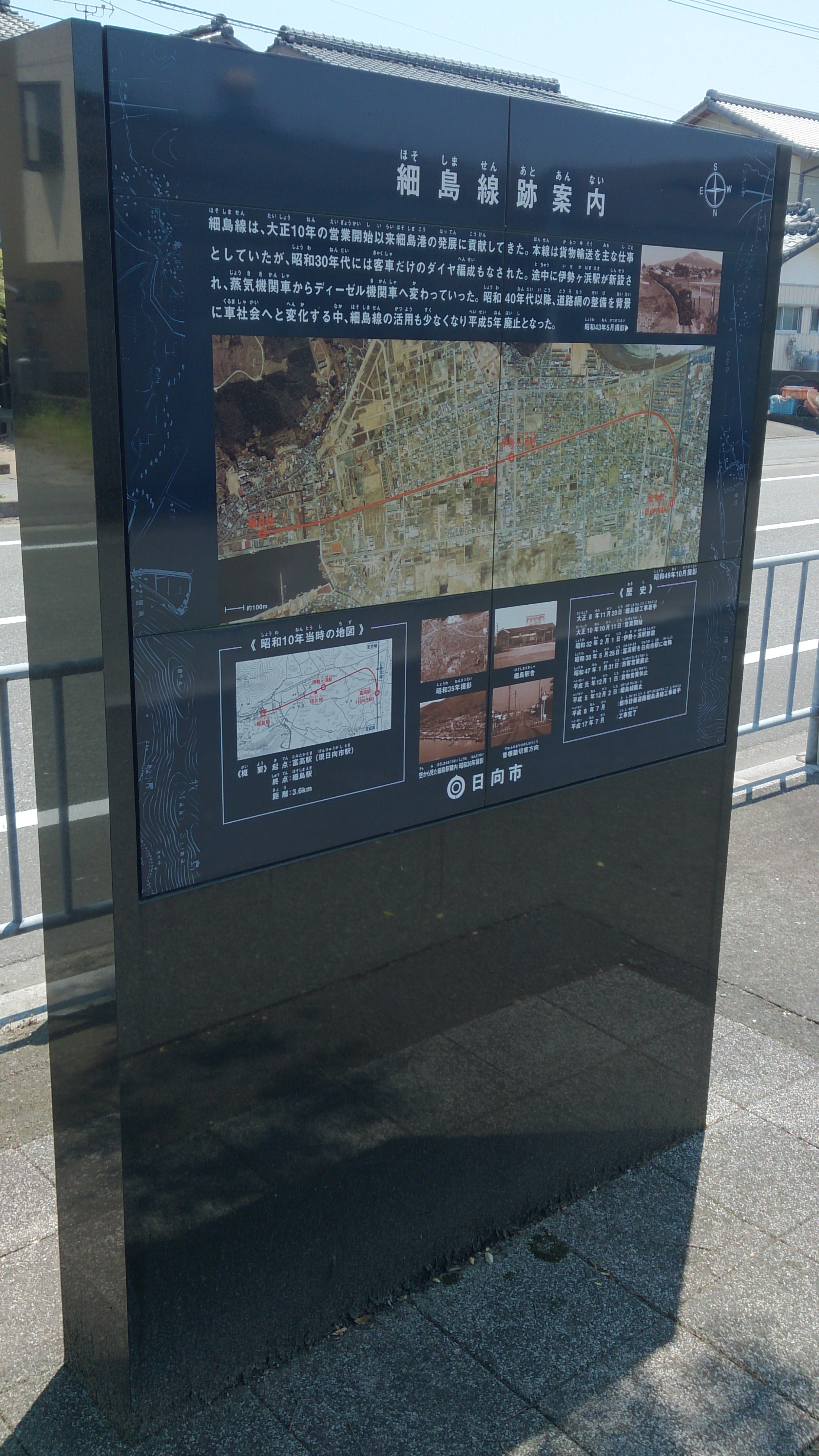 伊勢ケ浜駅跡地に建つ細島線の案内碑。